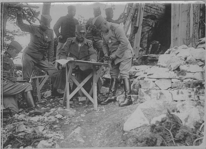 reportage photographique de l'armée française.